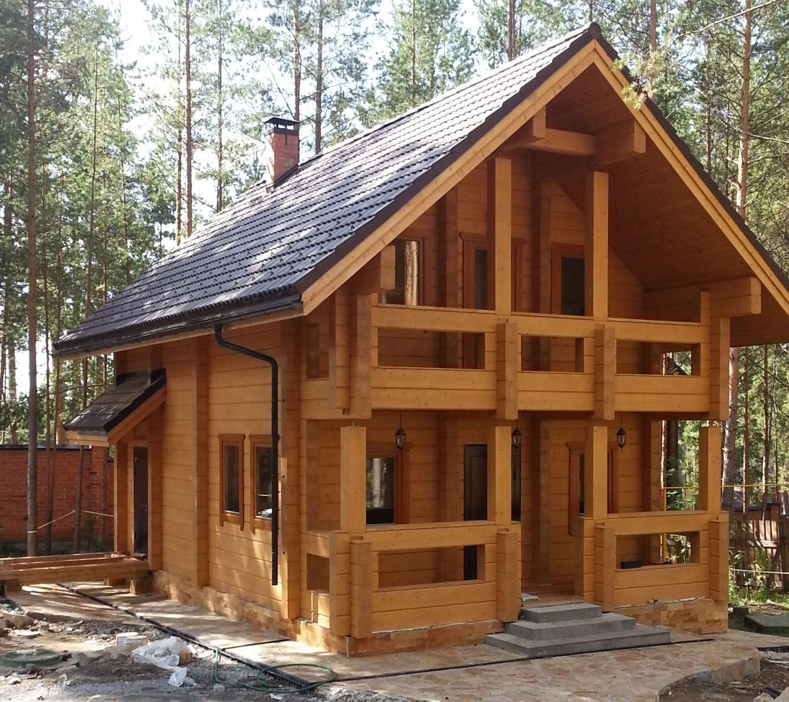 Баня, выполненная из клееного бруса сечением 275*242 мм. Объект выполнен строительной компанией Хольц-Мастер, г. Екатеринбург